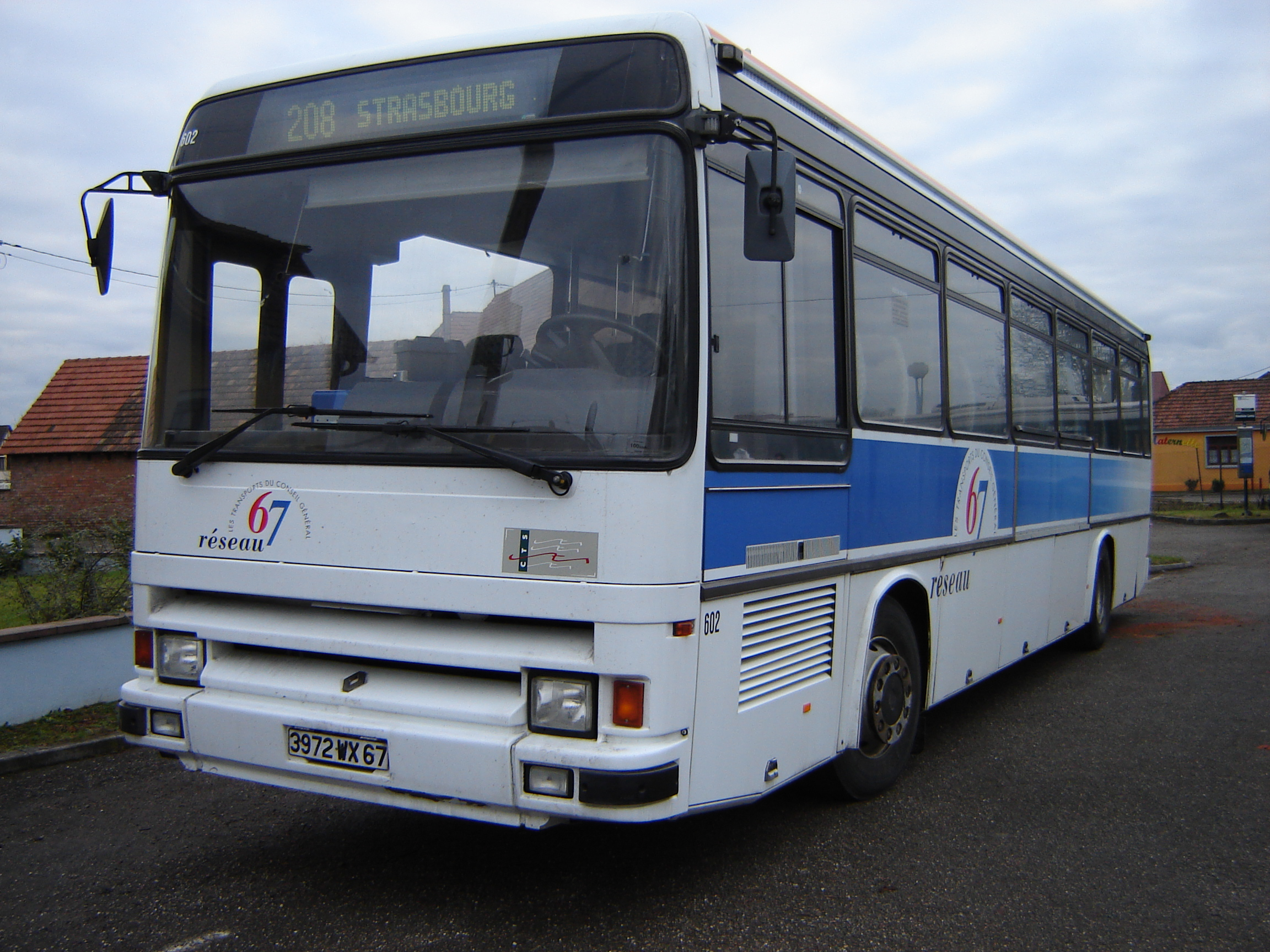 Renault Tracer du Réseau 67 à Blaesheim